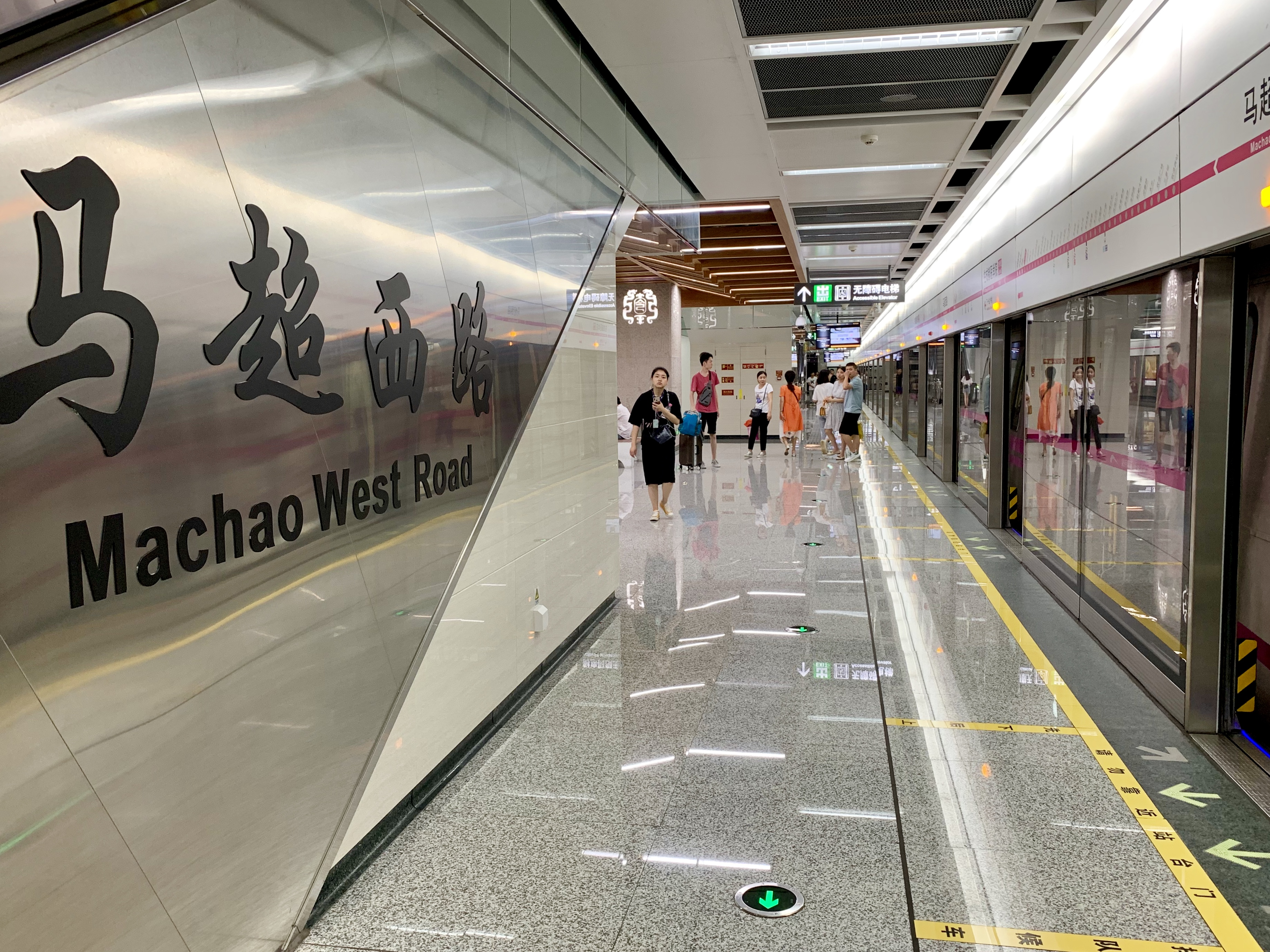 成都地铁马超西路站